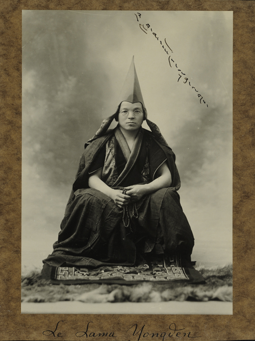 Fotograf ukjent. Reprofotografi Meyer, Elisabeth Portrett av Lama Yongden Tibet 1933. Vi har fire eksemplarer av samme motiv. 15,8 x 11 cm Sølvgelatin NMFF.003380-2